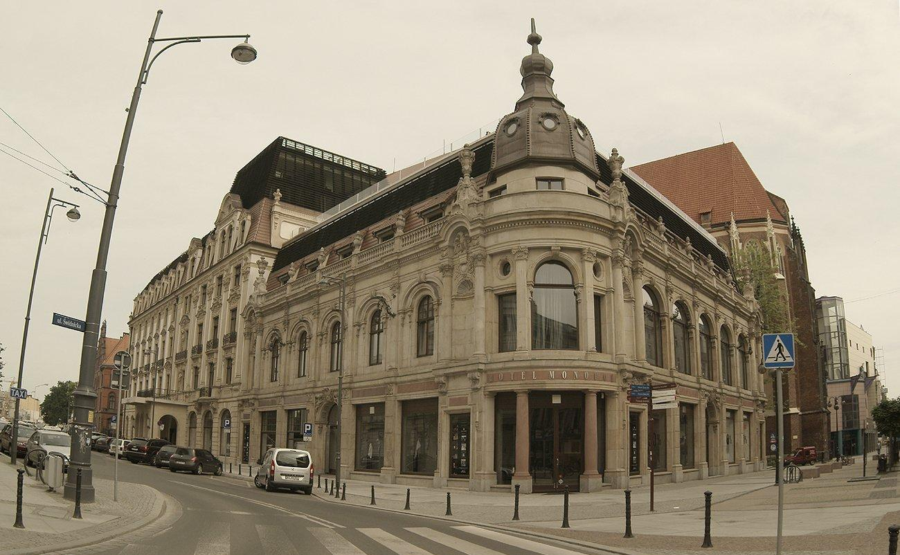 Wrocław Stare Miasto. ul. Modrzejewskiej 2 (Świdnicka 33) - Hotel Monopol, po remoncie wraz z działką 25/1 (zabytek nr 259/431/Wm)